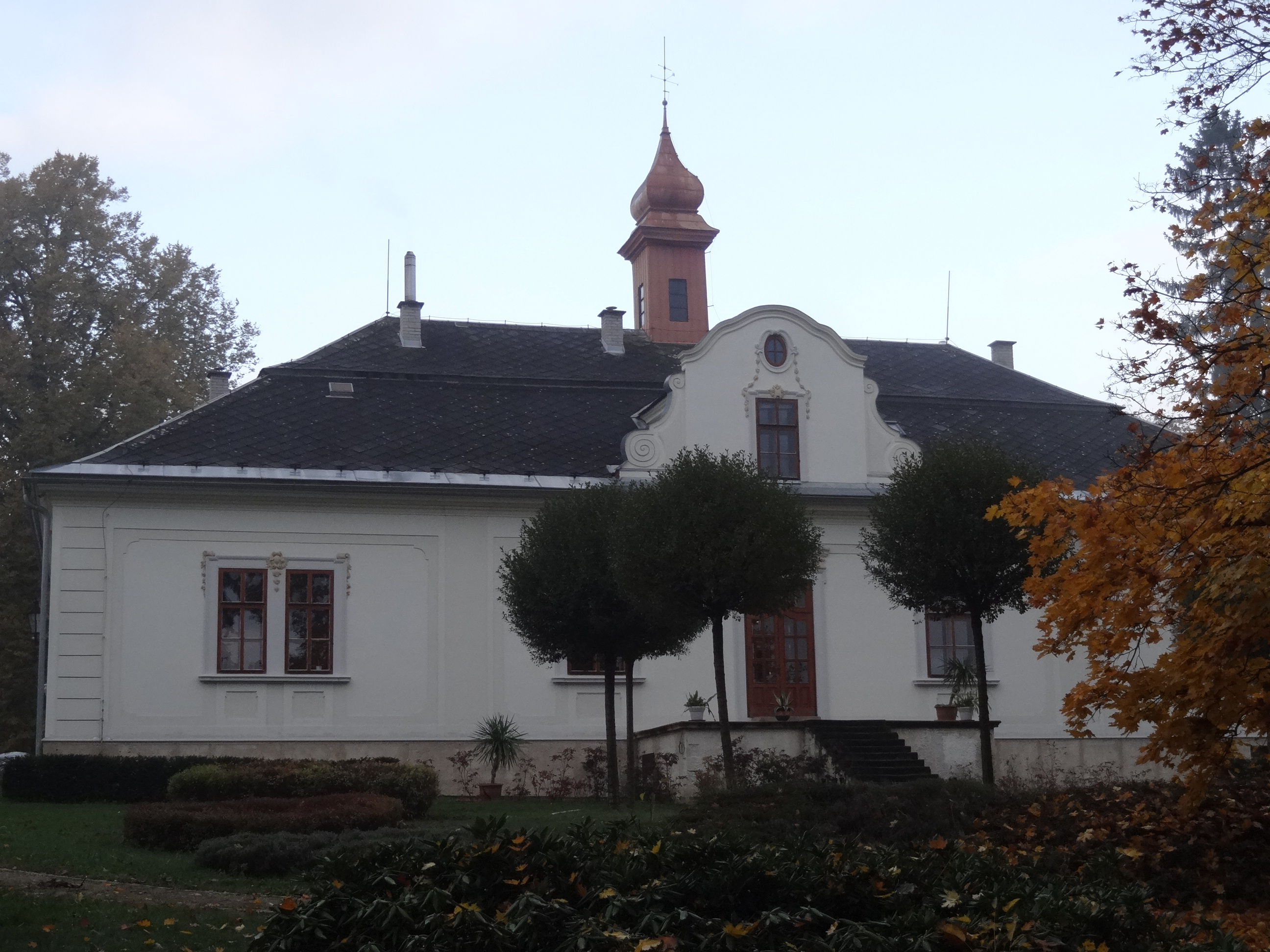 Zámek Skalička, Skalička 1754/15, Zábřeh.